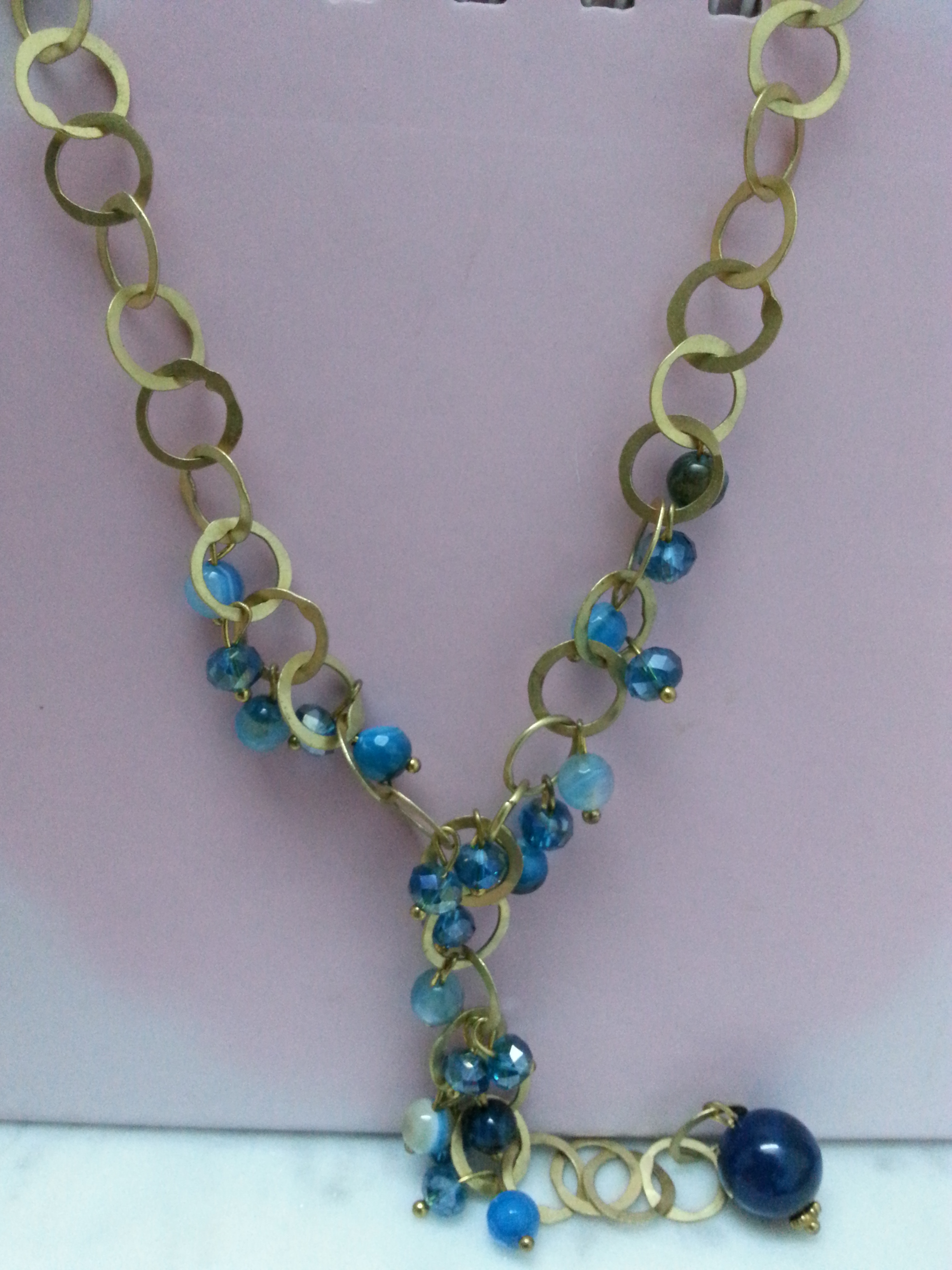 الحلي